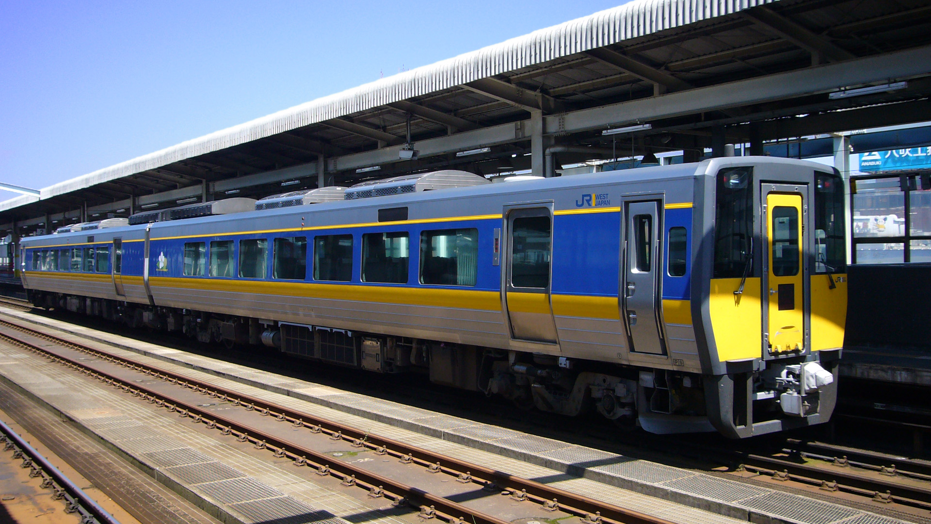 Tottori Station in Tottori, Tottori prefecture, Japan